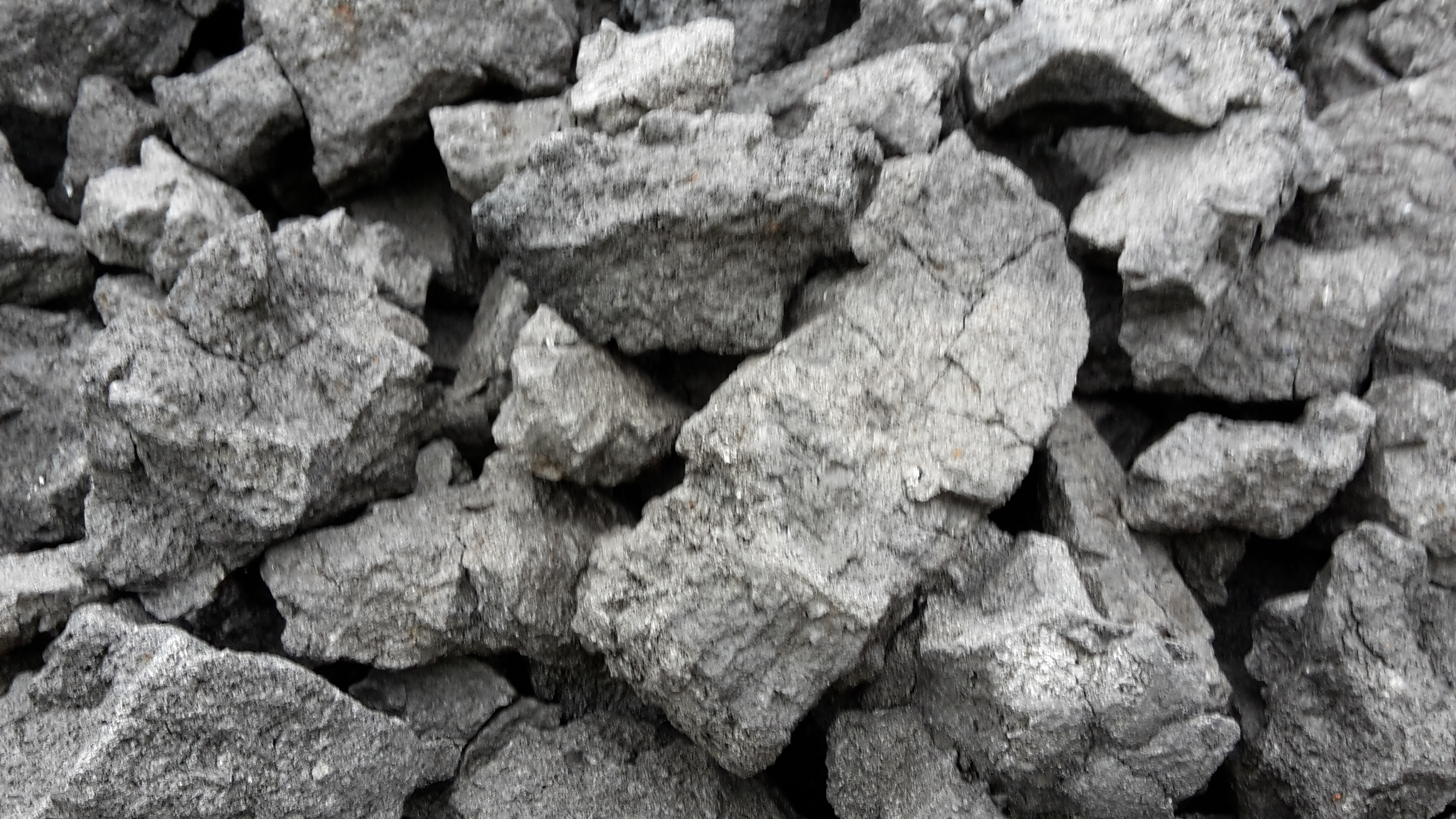 Steinkohlenkoks